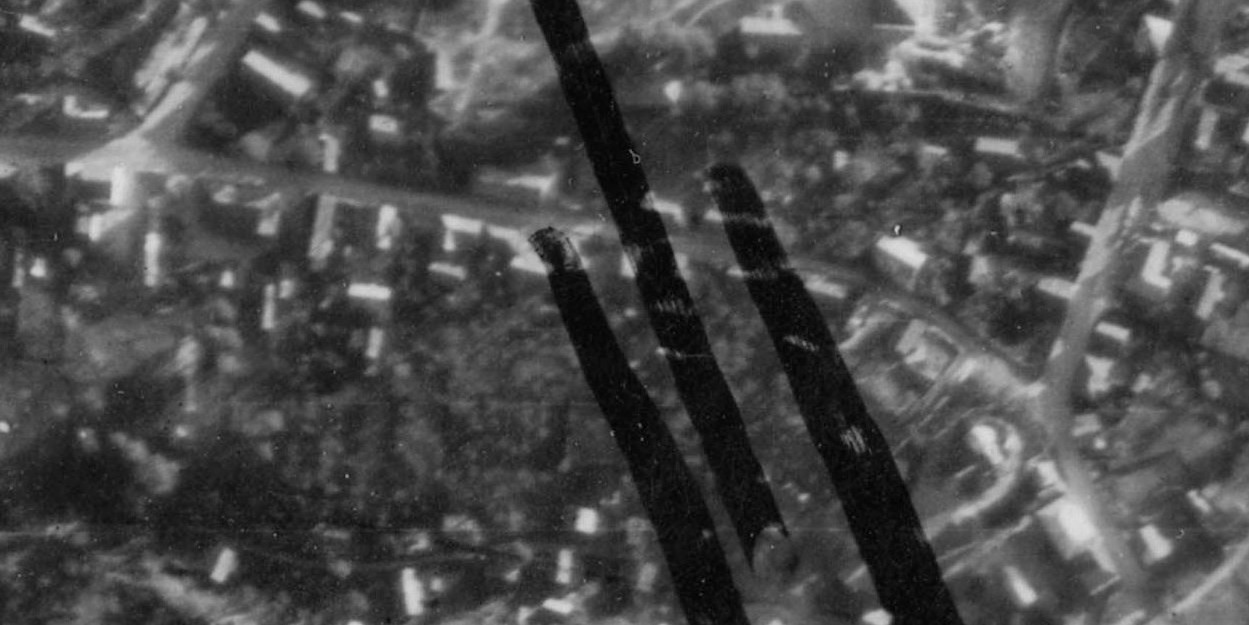 Магілёў. Нямецкі аэрафотаздымак